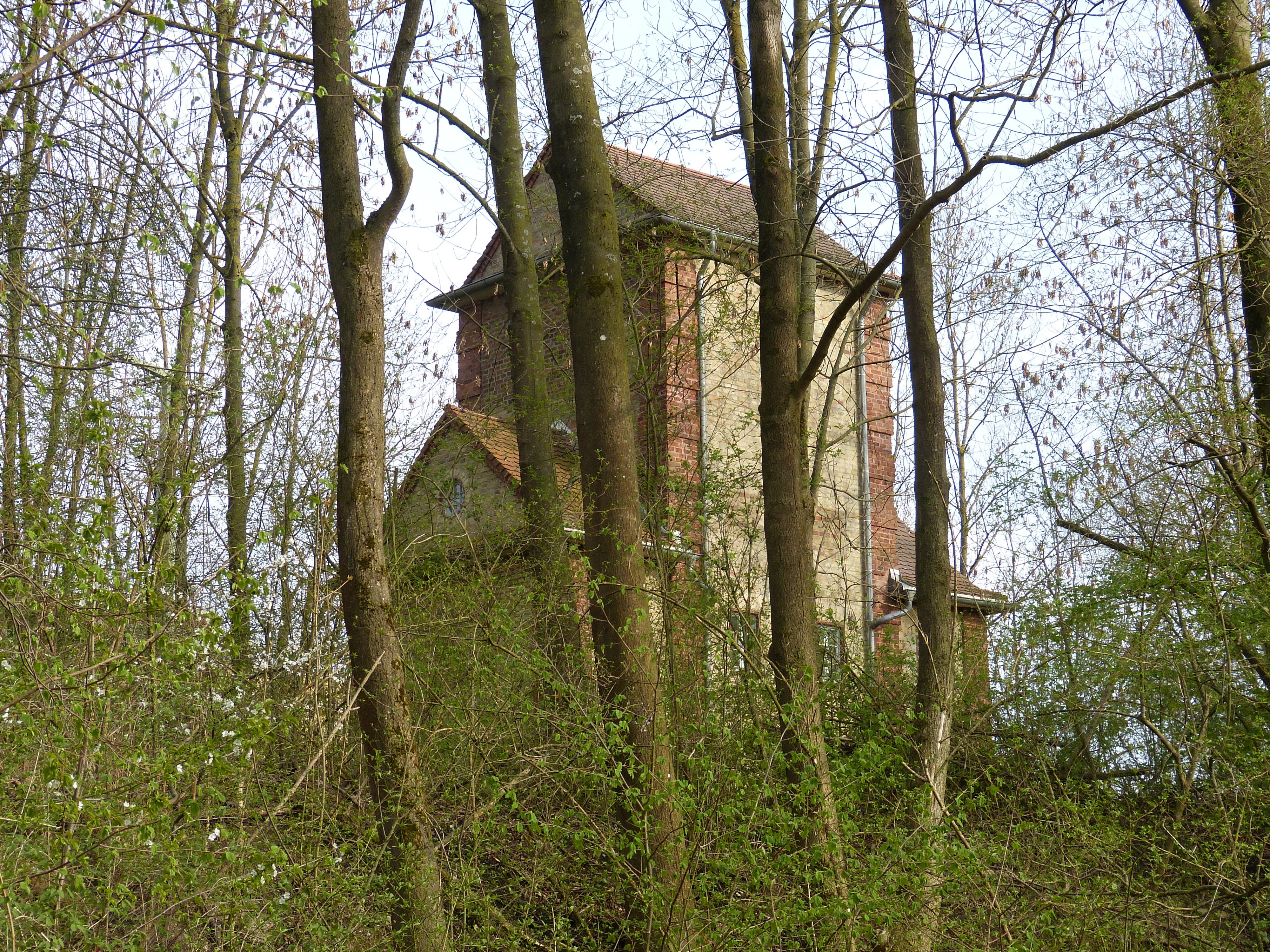 Umspannhaus des Wasserwerks Wolfzahnau.